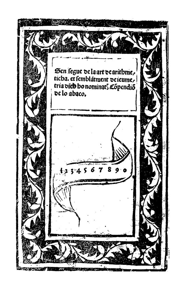 Frontespizio